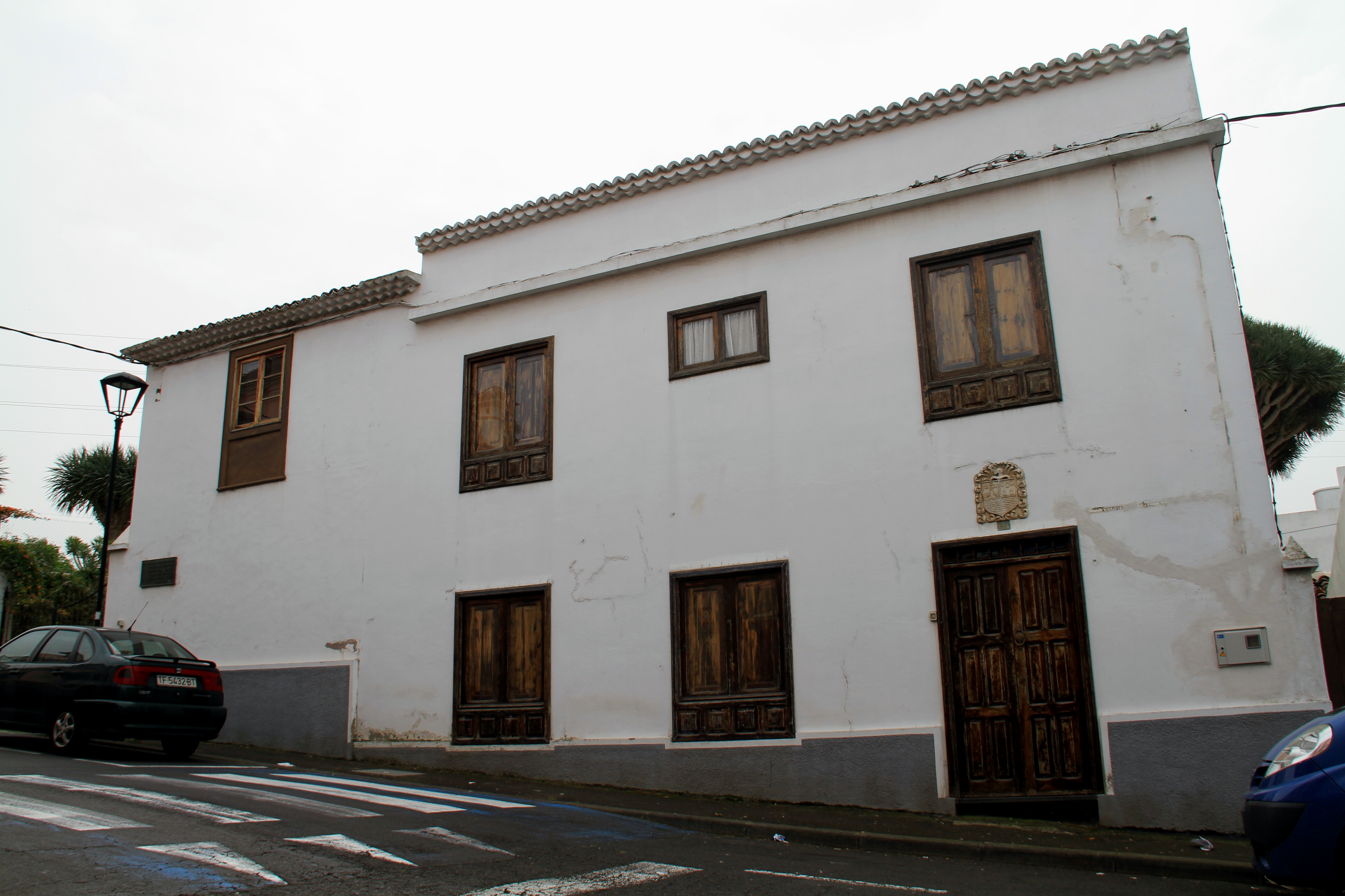 Frontal de la residencia del pintor surrealista Óscar Domínguez en Tacoronte, Tenerife (Islas Canarias, España). Fotografía: Héctor García Suárez.